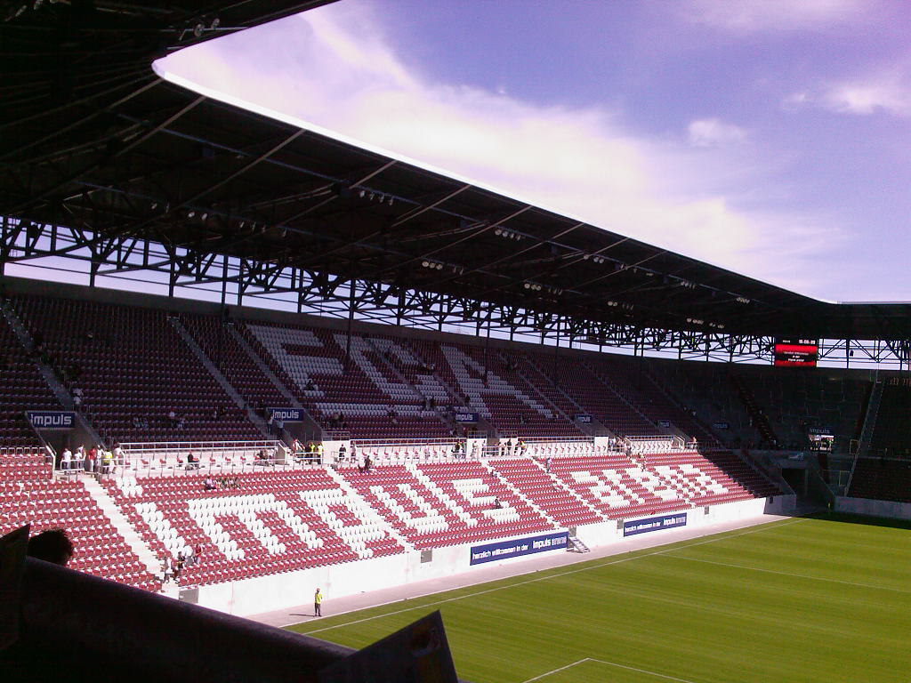 Die Gegentribüne der impuls arena am Eröffnungstag.